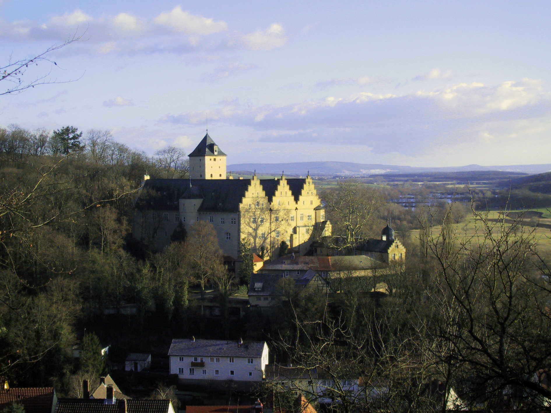 Schloß Mainberg bei Schonungen am Main im Frühjahr 2005